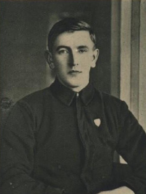 Walter Buchberger (1895-1970), československý lyžař německé národnosti